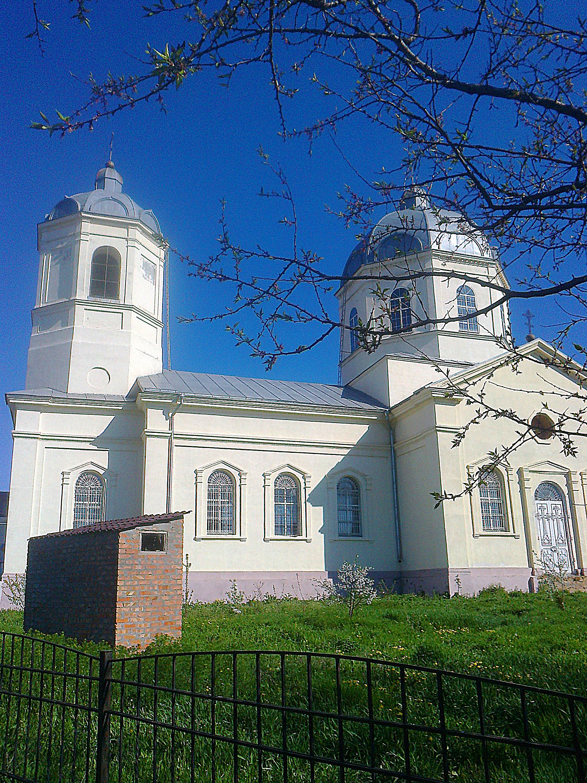 Церковь аствацацин (Ростовская область, Ростов-на-Дону, село большие салы, центр)